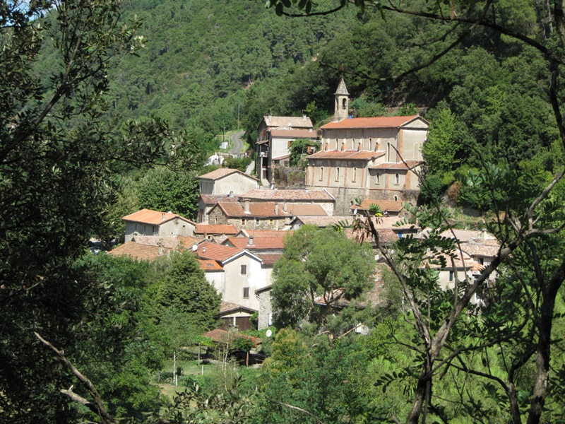 Village du Chambon et son église. Vue de la D29 vers le nord-ouest.